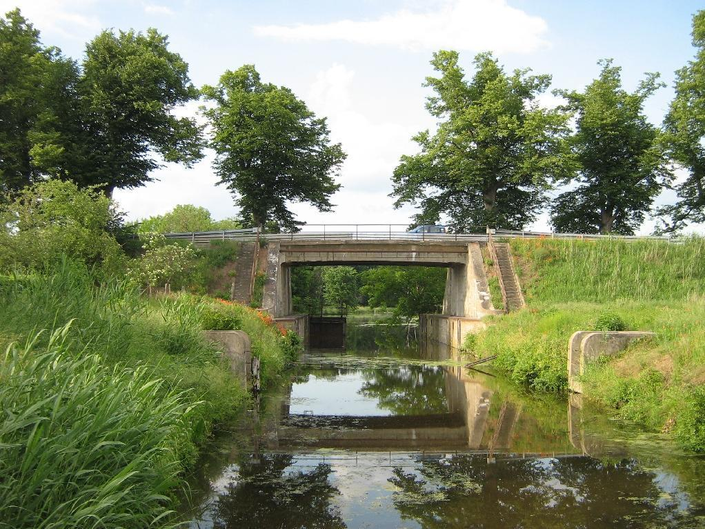 Brücke der Landstraße Ütz-Paretz über den Rest des „Nauen-Paretzer Kanals“. Der Kanal ist hier nur ein Reststück zwischen den Paretzer Erdlöchern und dem Havelkanal. Unterhalb der ehemaligen Schleuse wird der Kanalrest als Bootshafen genutzt - Google Maps - Google Earth